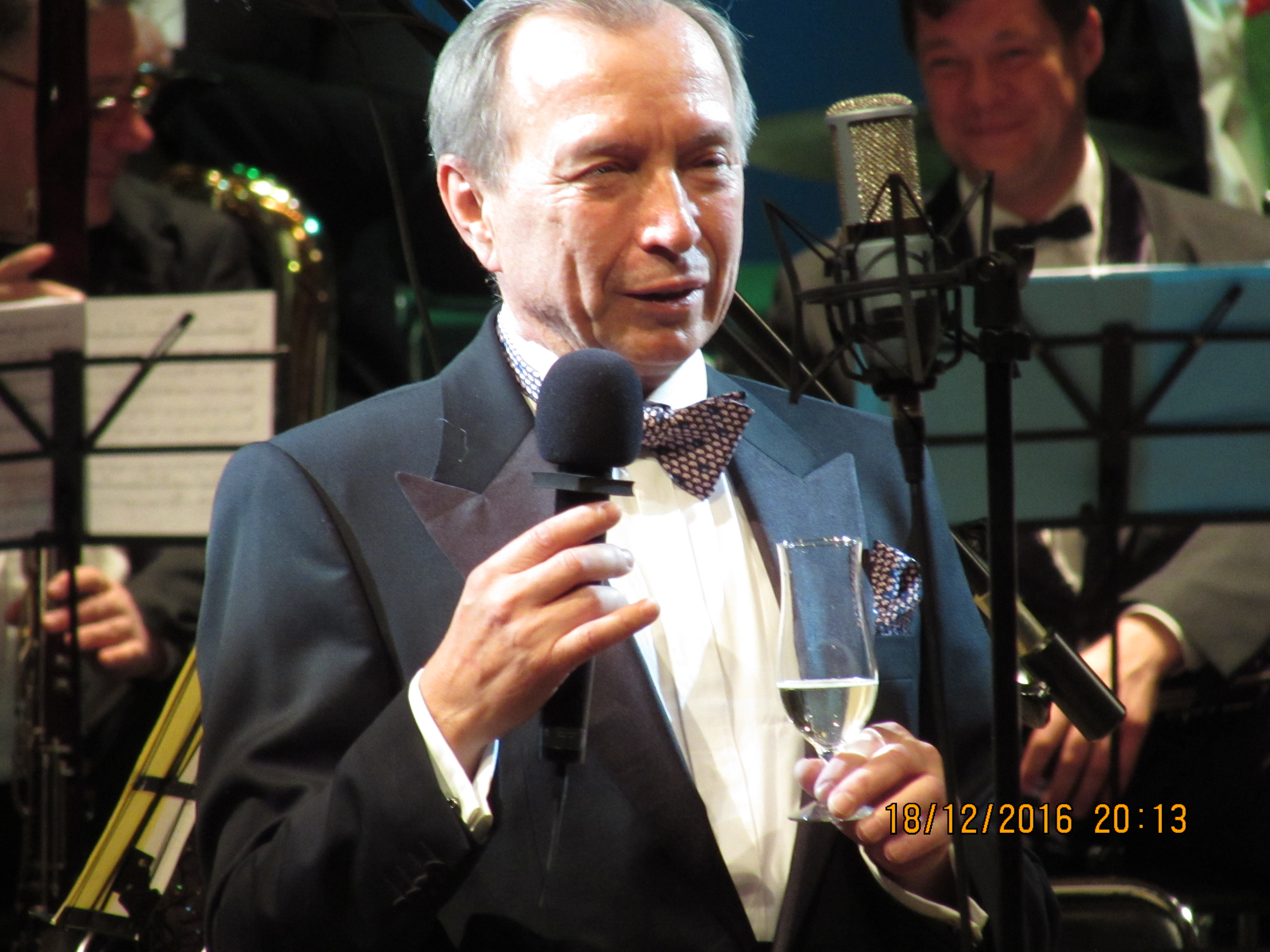 Микола Проданчук. В Національній опері під час концерту, присвяченого Дню Святого Миколая, 18.12.1916 р.